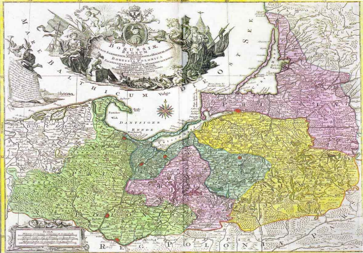 Borussiae Regnum complectens Circulos Sambiensem, Natangiensem et Hockerlandiae Nec non Borussia Polonica exhibens Palatinatus Culmiensem, Marienburgensem, Pomerelliae et Varmiae. Cum adjacentibus aliis Provinviis Mappa Geographica Sumtibus et Curis exarata Tobiae Conradi Lotteri, Geogr. Aug. Vind.